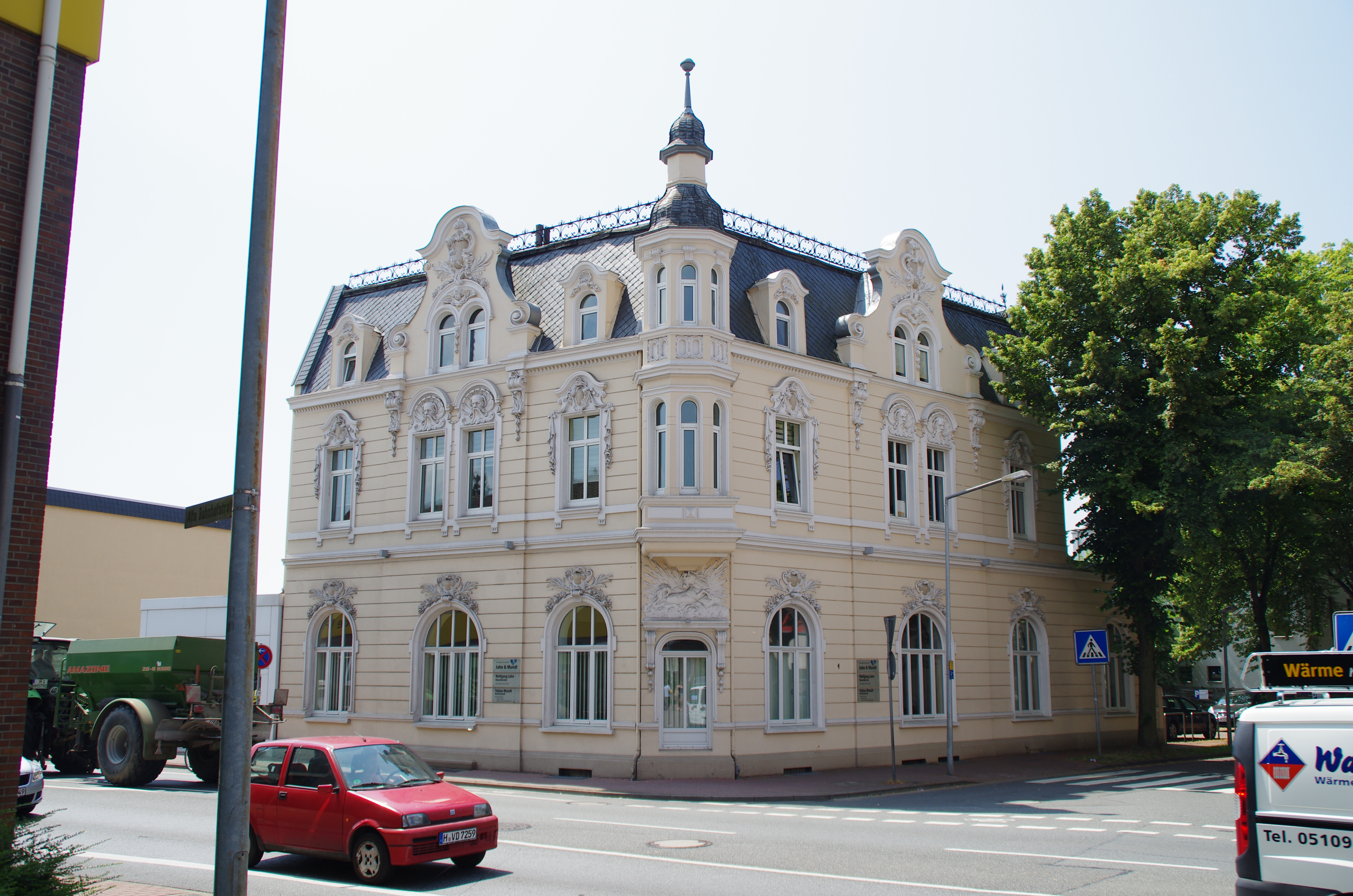 Wunstorf in Niedersachsen. Das Haus in der Straße Georgstraße 1 steht unter Denkmalschutz.